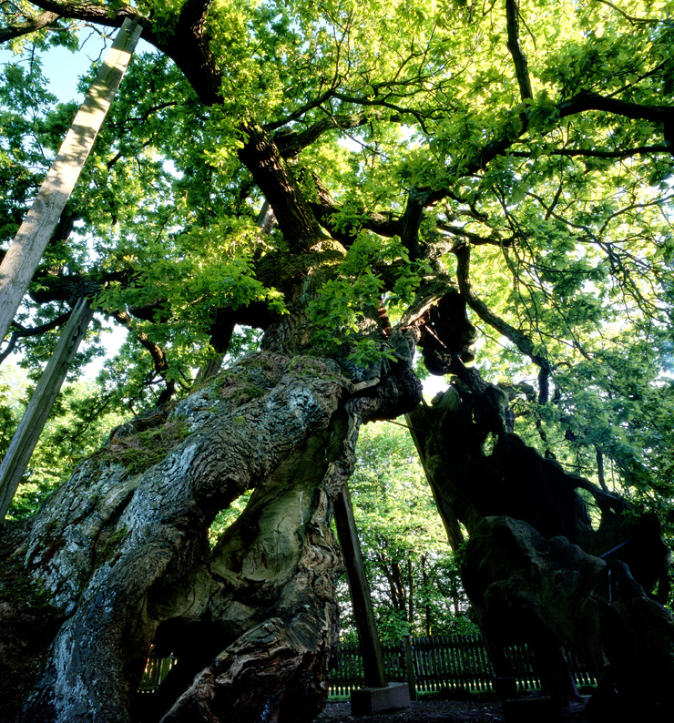 Femeiche (Quercus robur) in Erle